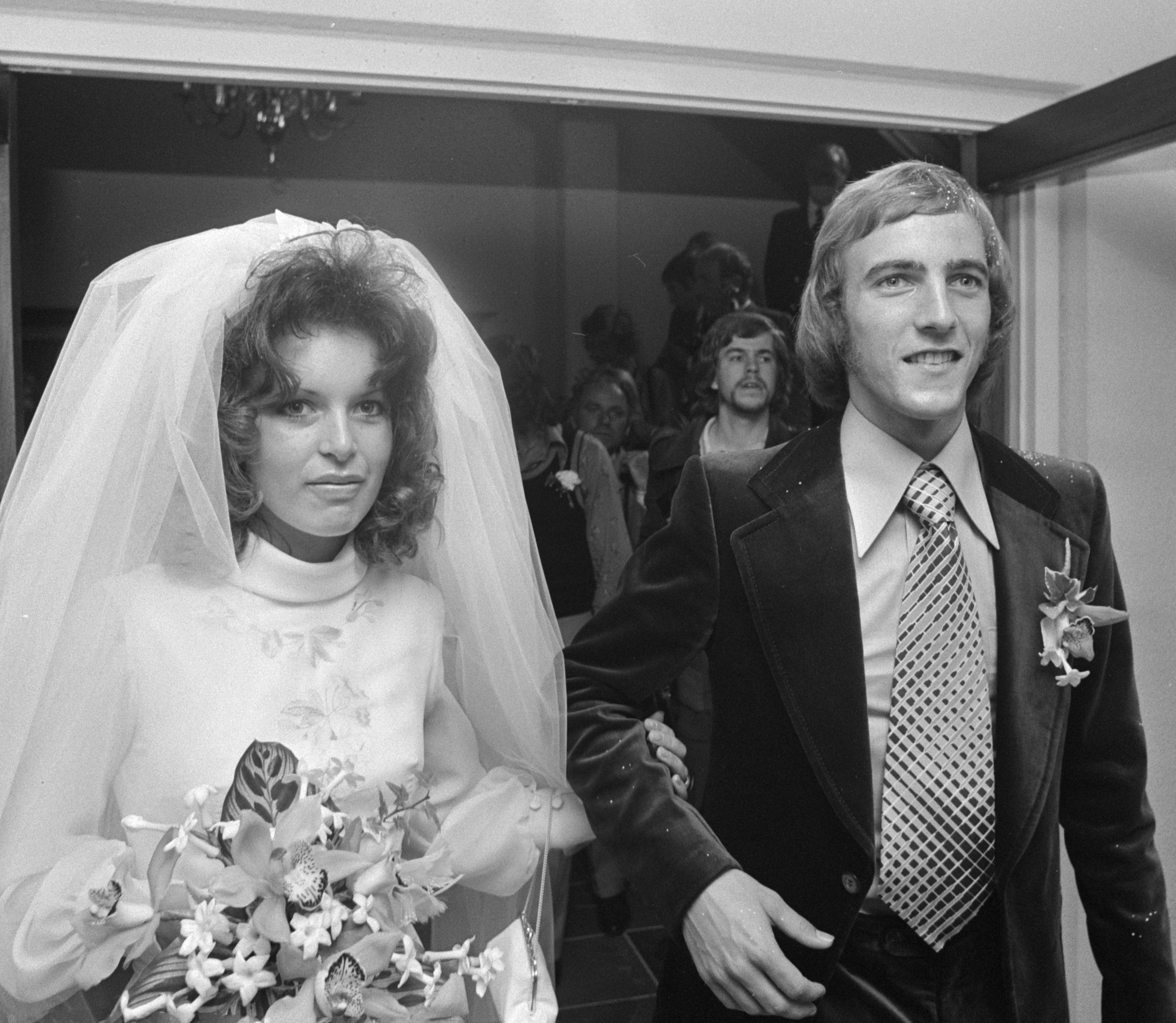 Johan Neeskens getrouwd met Marianne Schiphof in Heemstede; tijdens trouwplechtigheid